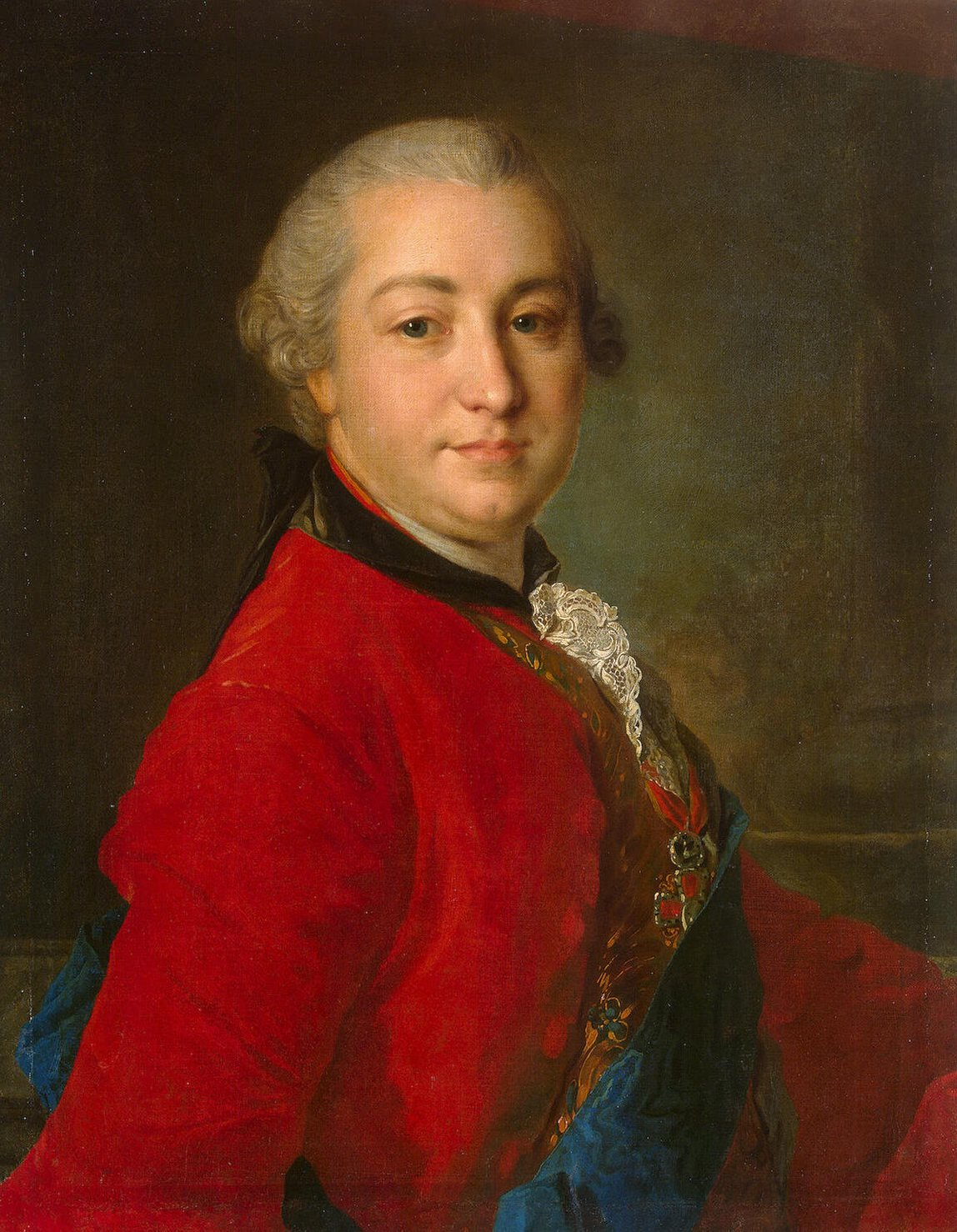 Портрет представляет собой вольную копию оригинала Л. Токе (1756–1758, ГЭ) и свидетельствует об обращении начинающего Рокотова к блестящим образцам иностранных мастеров, работавших в России в русле рокайльной культуры. Это сказалось в заимствовании изящного поворота фигуры изображенного и декоративной выразительности колорита, главную роль в котором играет насыщенный красный цвет кафтана.